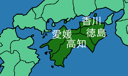 四国地方の自治体